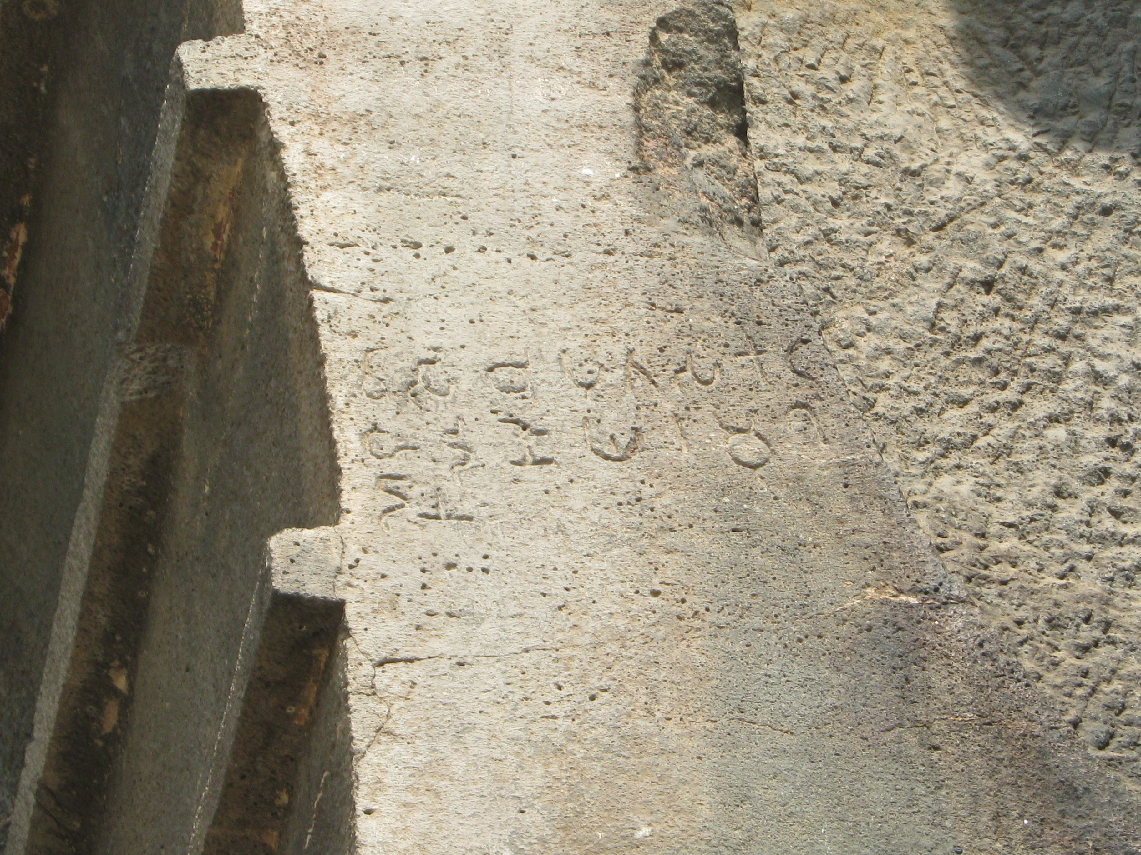 குடைவரைக் கோயில் கல்வெட்டு பிராமி எழுத்து